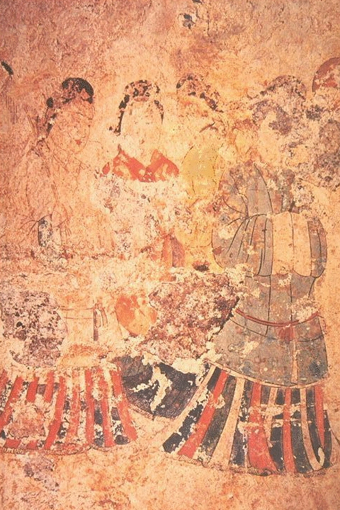 Mural from Takamatsuzuka Tomb, Asuka period